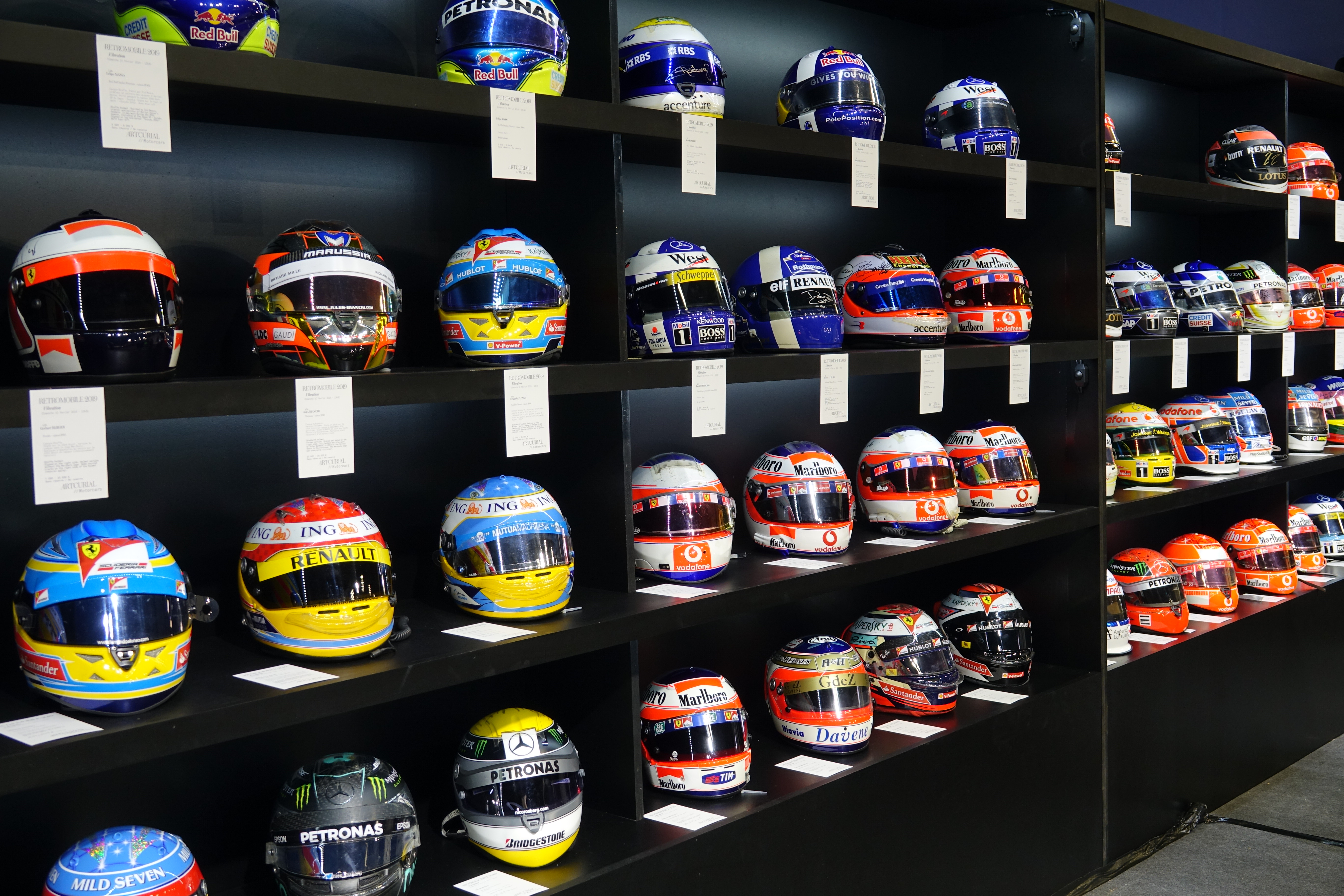 Vente Artcurial Rétromobile 2019